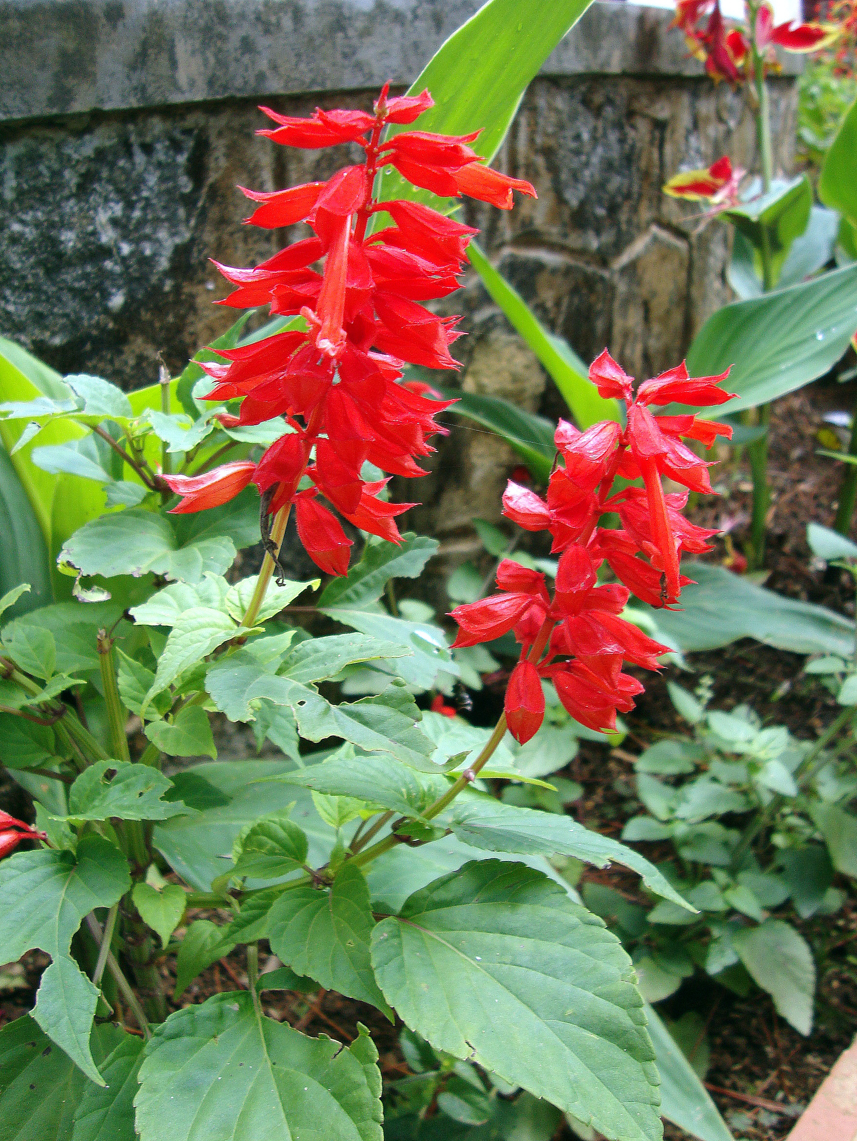 Salvia splendens Sellow ex Schult. in Roem. & Schult., 1822